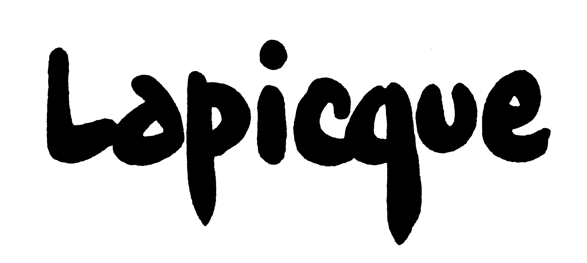 Signature du peintre Charles Lapicque. This signature is believed to be ineligible for copyright and therefore in the public domain because it falls below the required level of originality for copyright protection both in the United States and in the source country (if different). In this case, the source country (e.g. the country of nationality of the signatory) is believed to be France. Cette image ou le texte qui y est représenté est seulement composé de formes géométriques simples et de texte. Elle n’atteint pas le seuil d'originalité nécessaire pour la protection du droit d’auteur, et est donc du domaine public. See autographs of Magritte and Picasso